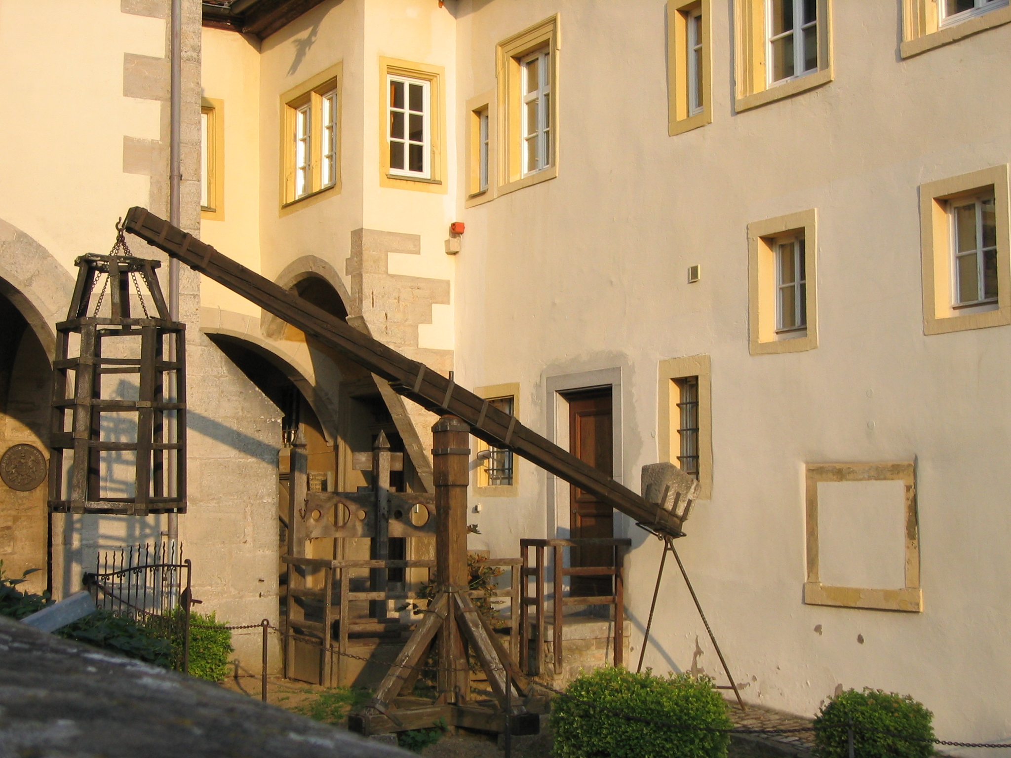 Bäckerkorb, oder auch Schandkorb; dieser wird mit dem Delinquent ins Wasser getaucht. Im Mittelalter wurden Bäcker die zu kleine Brötchen buken, hierzu verurteilt (Exponat im Mittelalterlichen Kriminalmuseum Rothenburg ob der Tauber) -- Nähere Beschreibung fehlt.